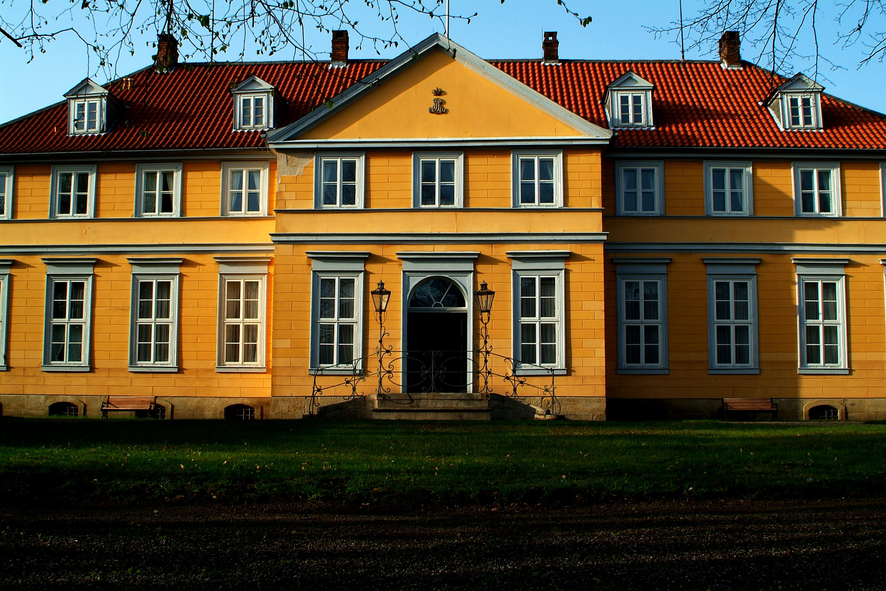 Das denkmalgeschützte Fürstenhaus Herrenhausen-Museum im Besitz der Welfenfamilie zeigt Möbel, Gemälde, Porzellan und Skulpturen aus der Zeit bis zum Ende des Königreichs Hannover und bietet nach telefonischer Vereinbarung Gruppenführungen ab 10 Personen an.